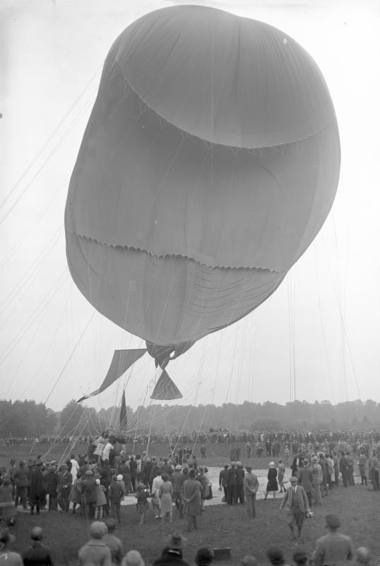 Prof. Piccard wieder startbereit zu seinem Stratosphären-Flug in 16.000 m Höhe in Augsburg! Der Riesenballon, welcher Prof. Piccard und einen Begleiter in die Stratosphäre tragen soll, auf dem Startplatz.